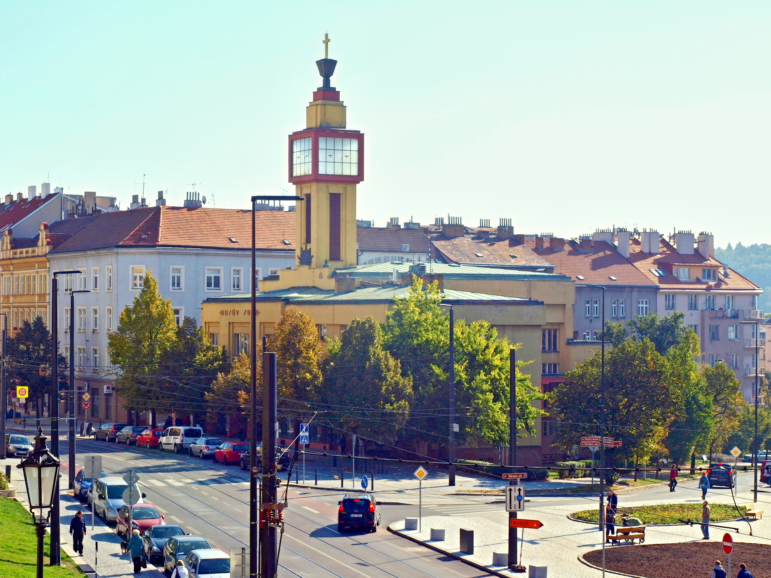 Husův sbor Vršovice